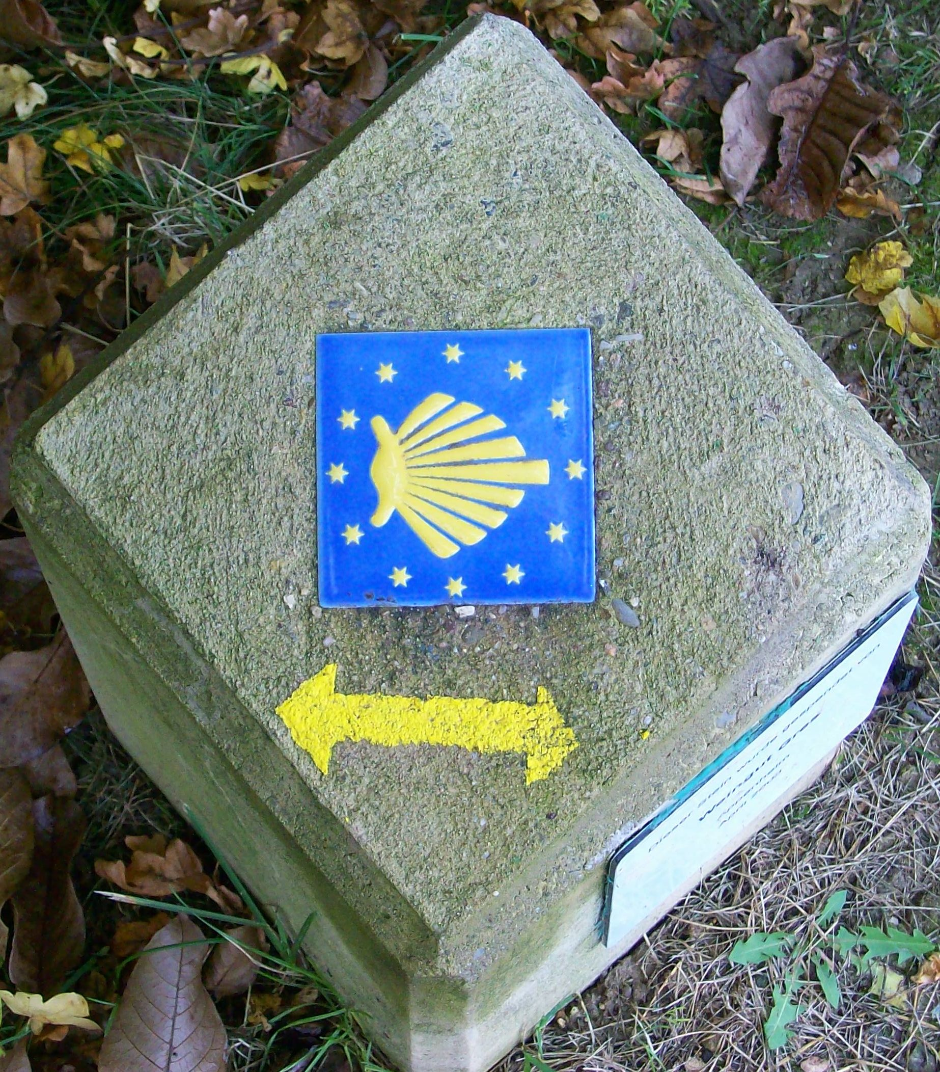 Markierungsstein Rheinhessischer Jakobsweg